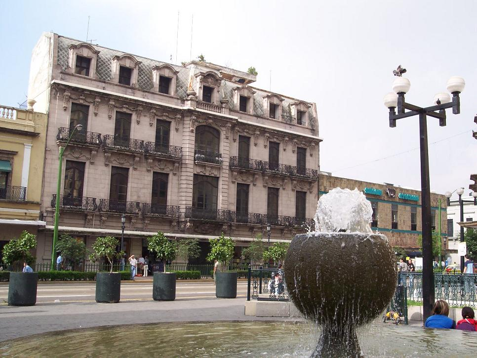 Description: Plaza Universidad Guadalajara Source: Own Job Date: 06-08-04